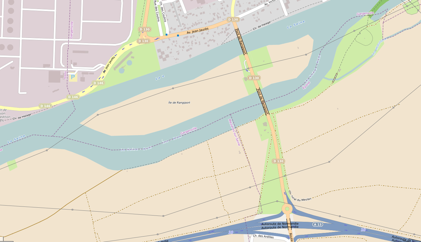 Plan de situation des ponts de Rangiport sur la Seine entre les communes d'Épône (au sud) et Gargenville (au nord) (Yvelines, France). Entre les deux ponts l'île de Rangiport.